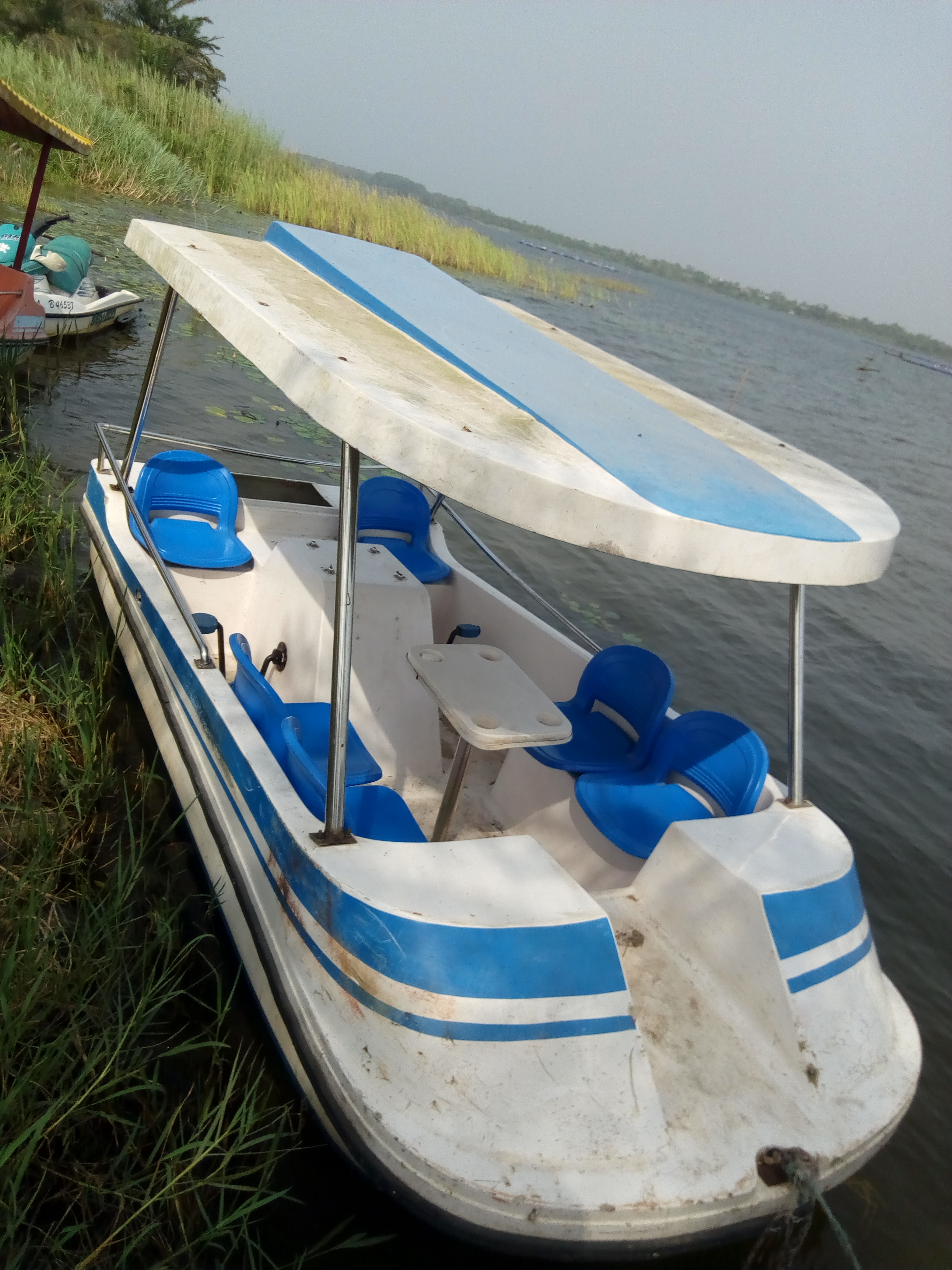 pirogue du lac toho au Bénin